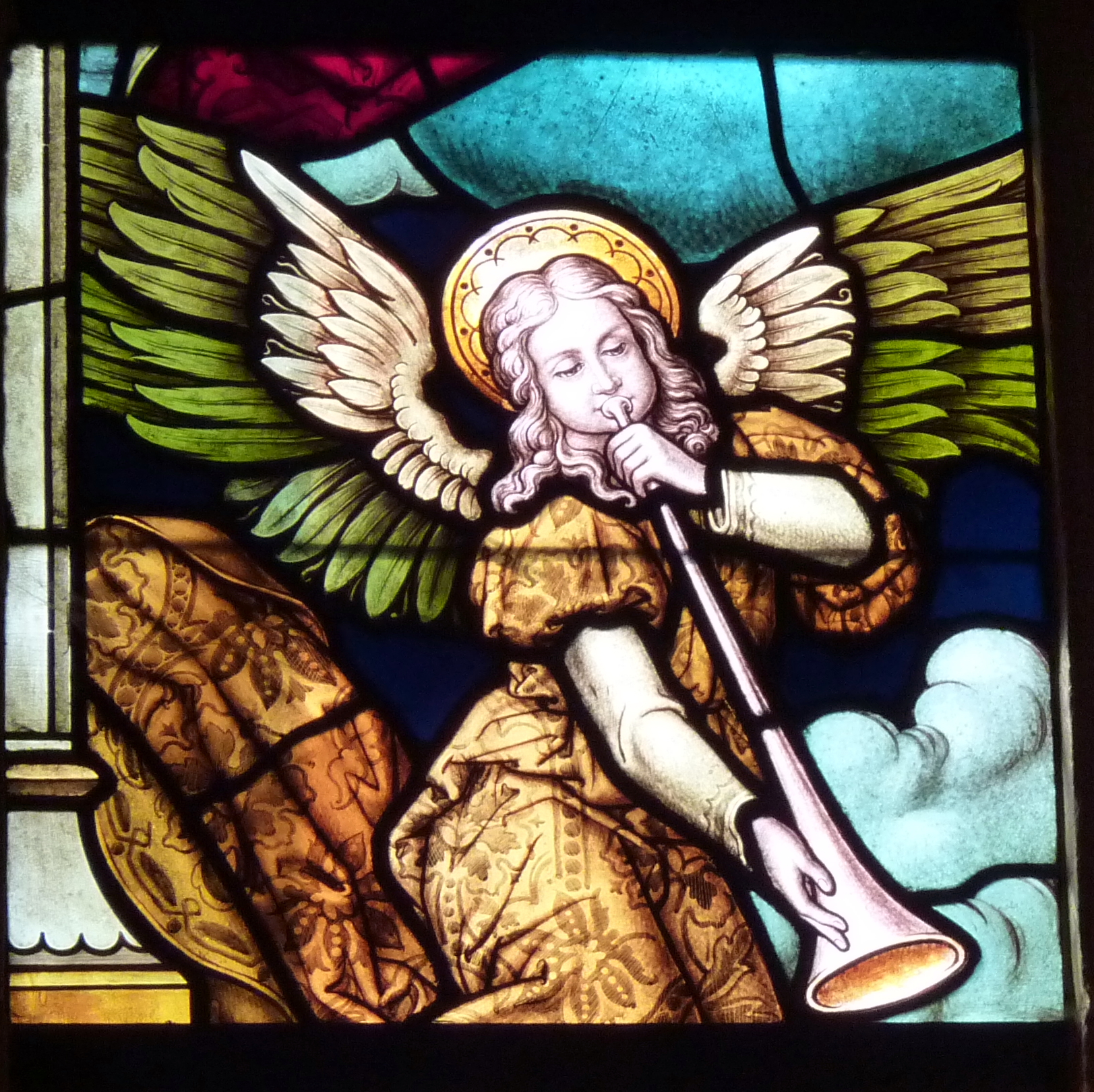 Bleiglasfenster (Ausschnitt) in der katholischen Pfarrkirche St. Johannes der Täufer in Burgbrohl, Darstellung: musizierender Engel